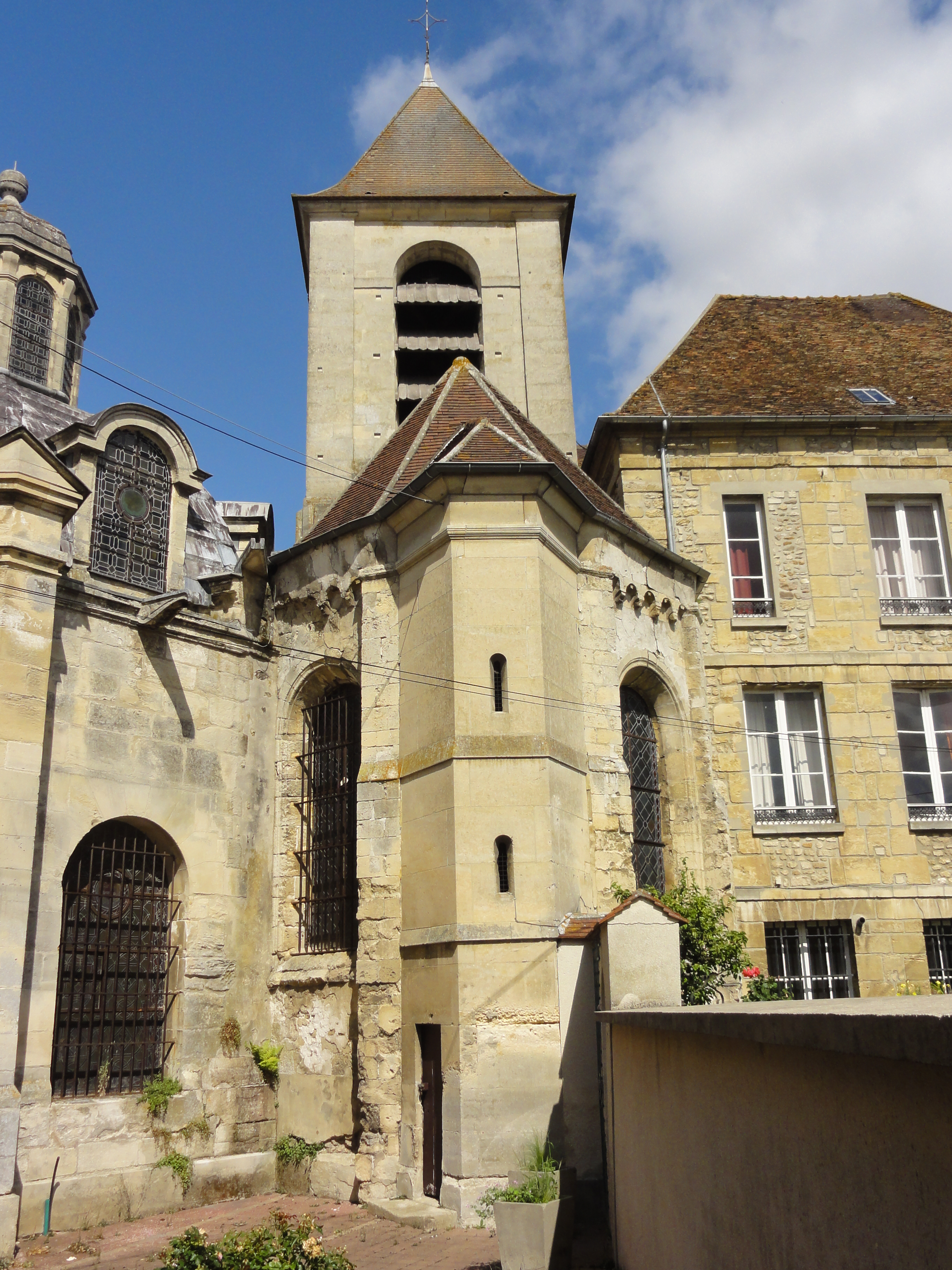 Église Saint-Rémi de Marines (voir titre).